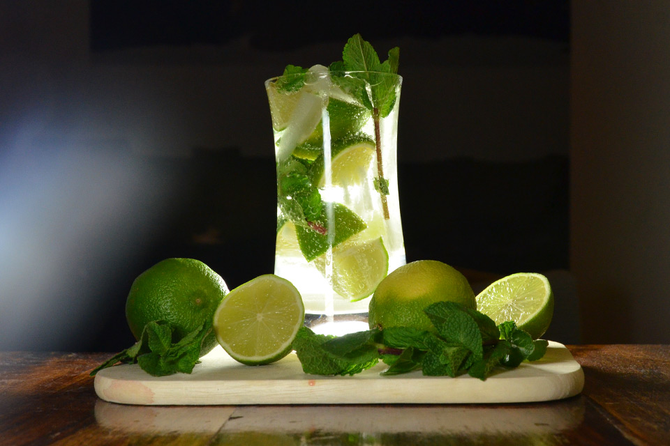 Typischer Mojito in Kuba